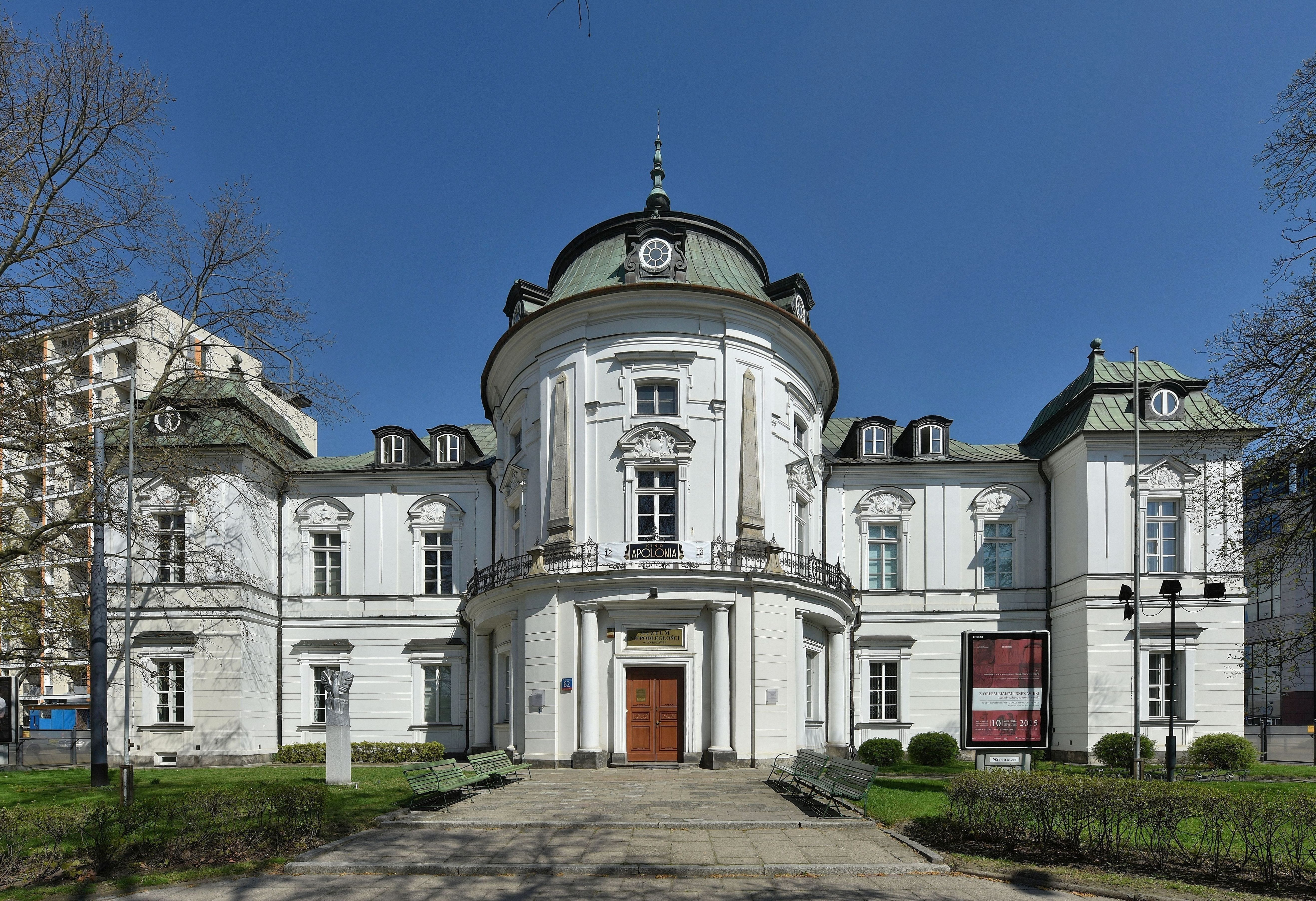 Pałac Przebendowskich (Radziwiłłów) w Warszawie, elewacja zachodnia